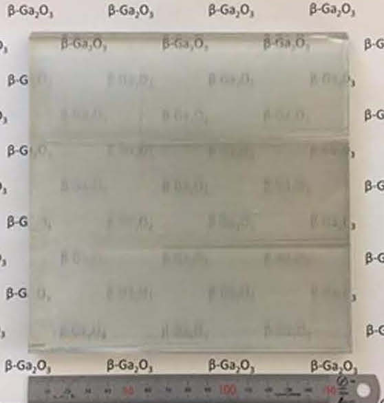 Gallium(III) oxide crystal